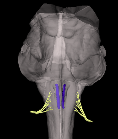 Hipoglosoaren nukleo eragile somatikotik ateratzen diren hipoglosoaren nerbioaren zuntzen irudikapena.